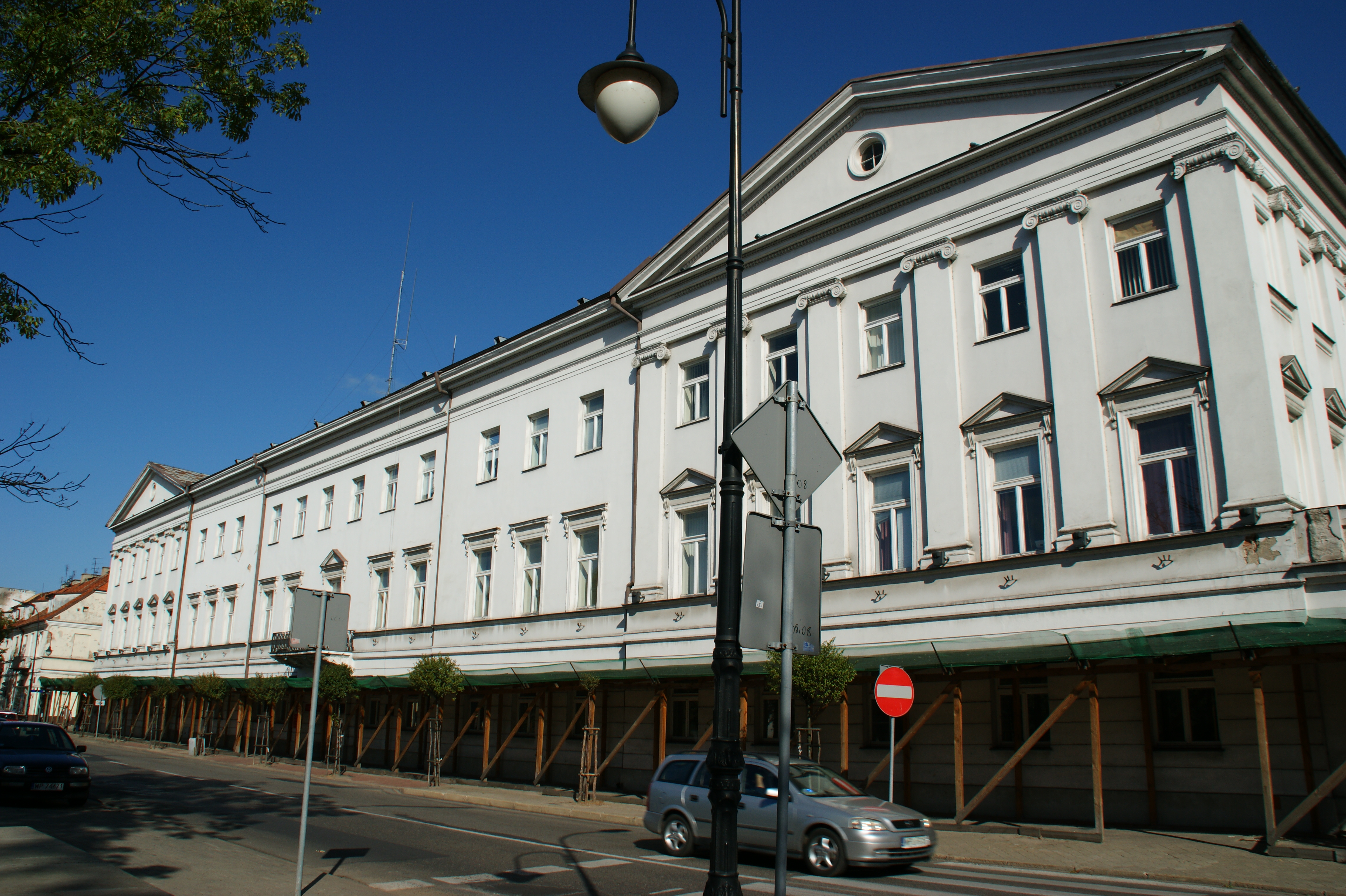 Płock, ul. Kolegialna 15 - dawna komora celna, tzw. kamera pruska, mur., 1802, 1844, obecnie delegatura Mazowieckiego Urzędu Wojewódzkiego (zabytek nr 482 z 29.01.1979)